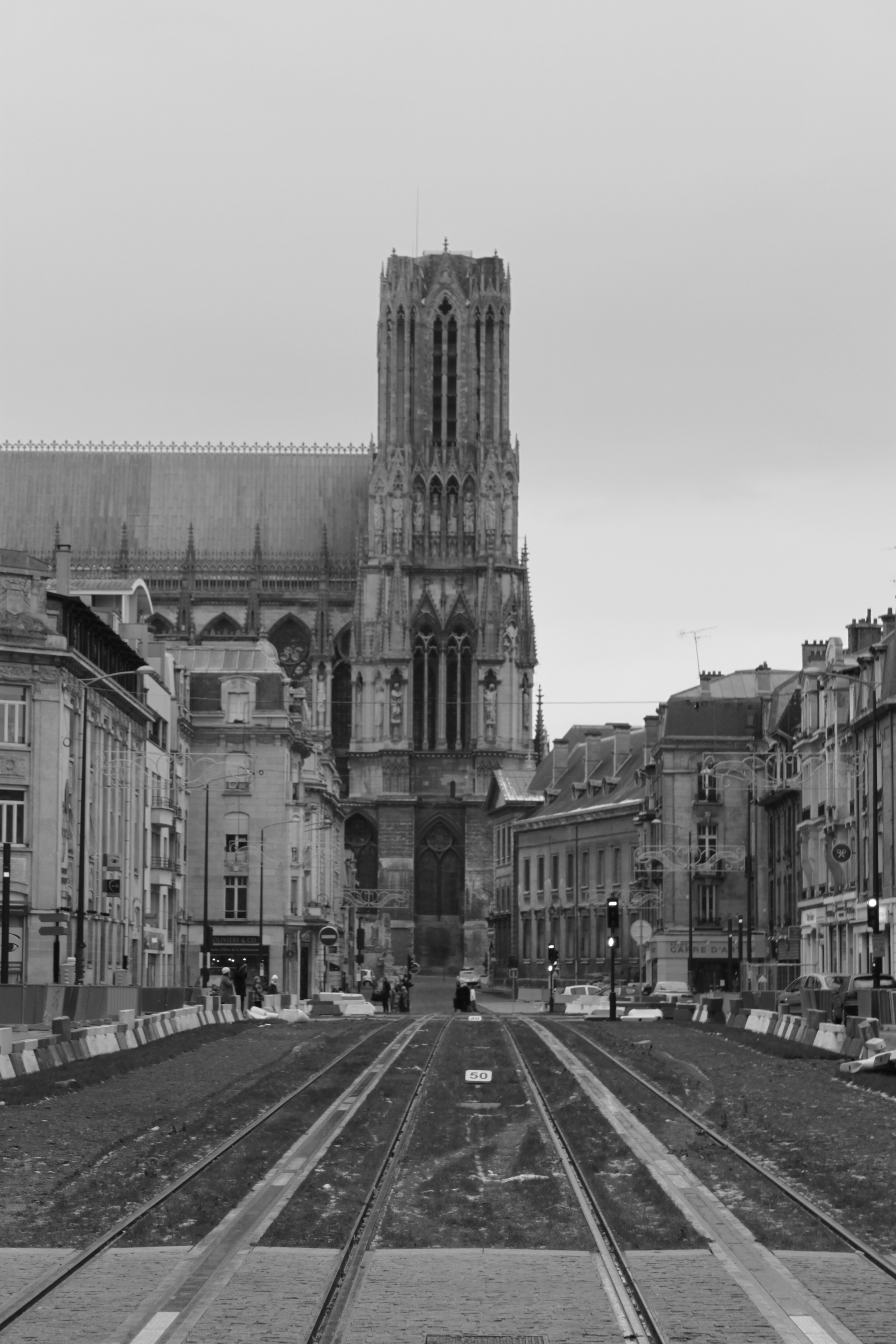 Cathédrale, Reims